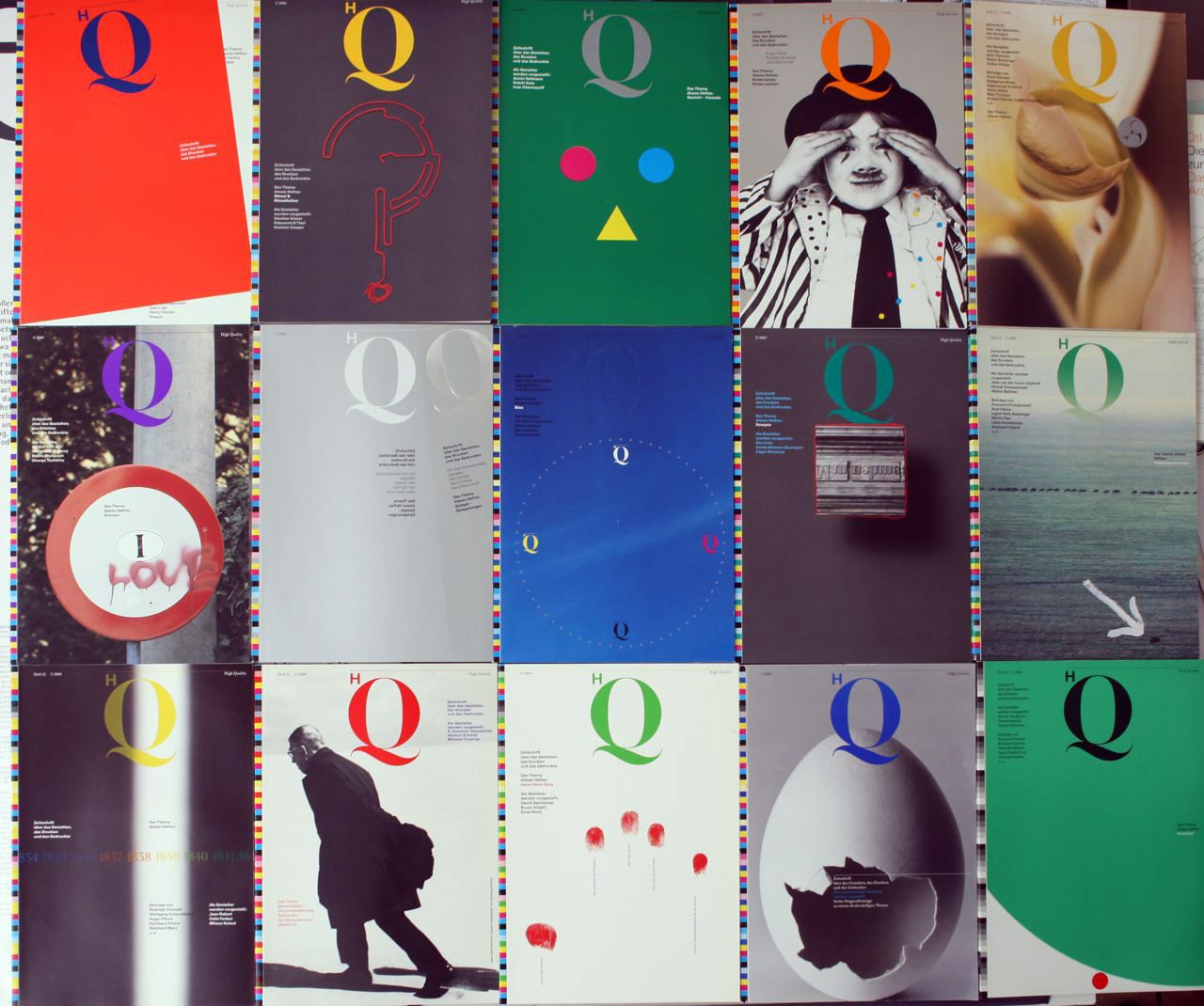 Diverse Titel des Magazins „High Quality“ von Rolf Müller (Designer). Aufgenommen am 02.02.2012 in der Galerie Brandt / Galerie Reiber in München (Kapuzinerstr. 41; geöffnent Mittwoch und Donnerstag 17:00 - 20:00